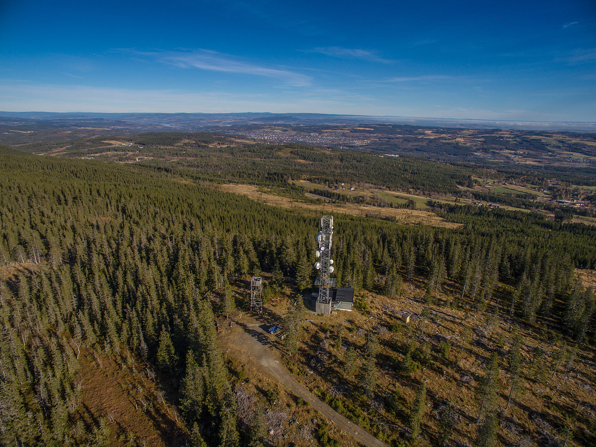 Lauvhøgda Høst 2015. Fotograf: Alexander Kvale, Luftfoto Innlandet.